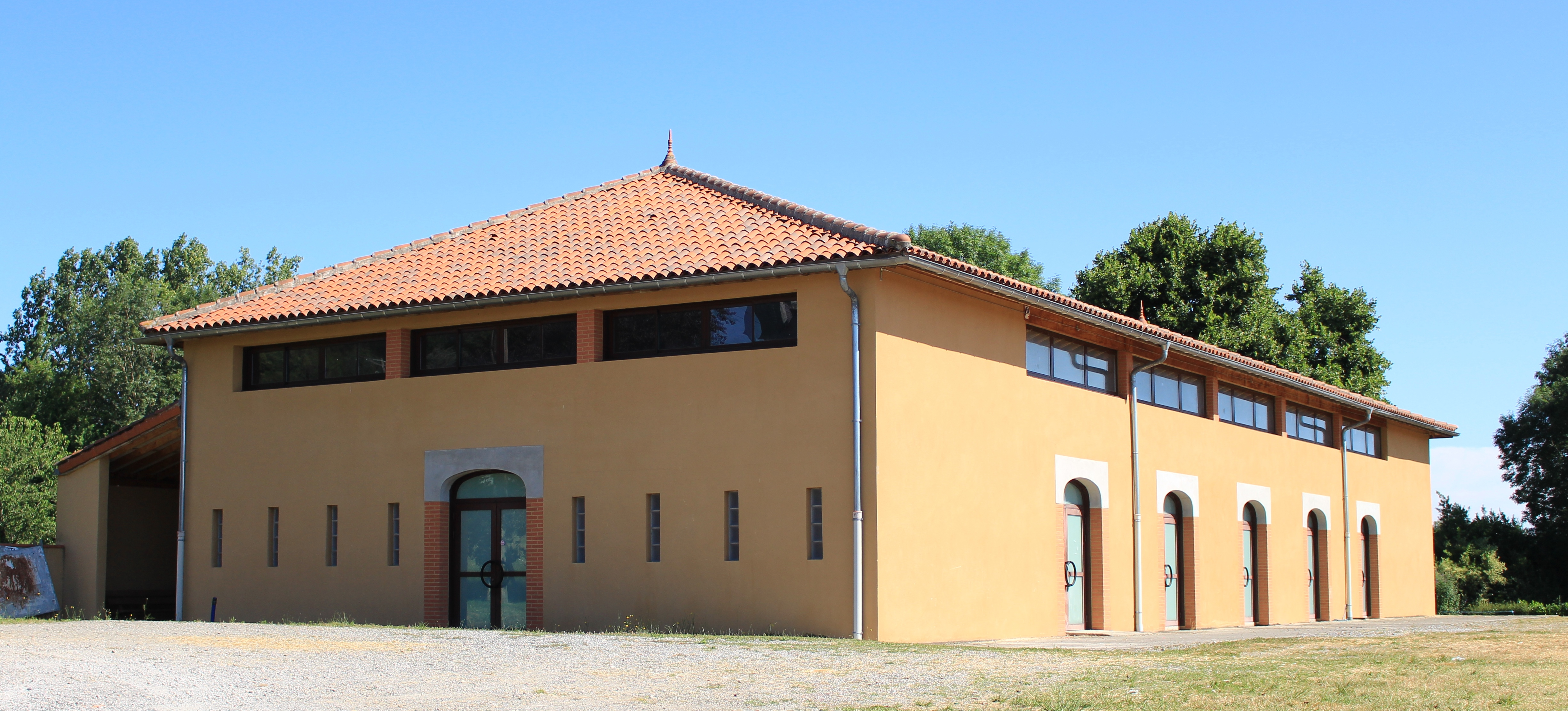 Salle des fêtes de Burg (Hautes-Pyrénées)